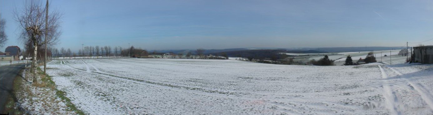 Ansicht von der Nähe des Sportplatzes